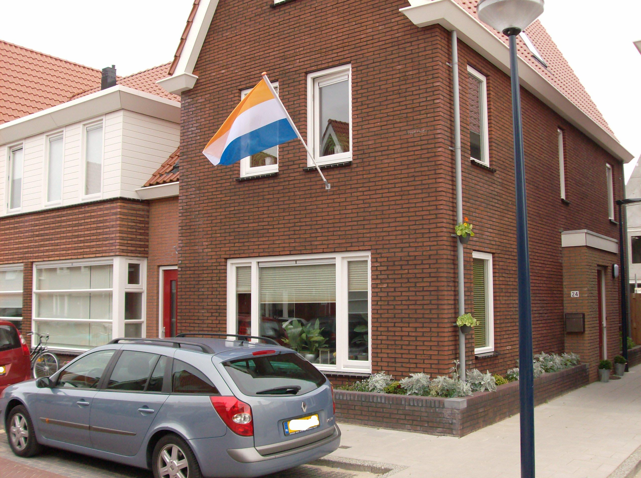 Prinsenvlag